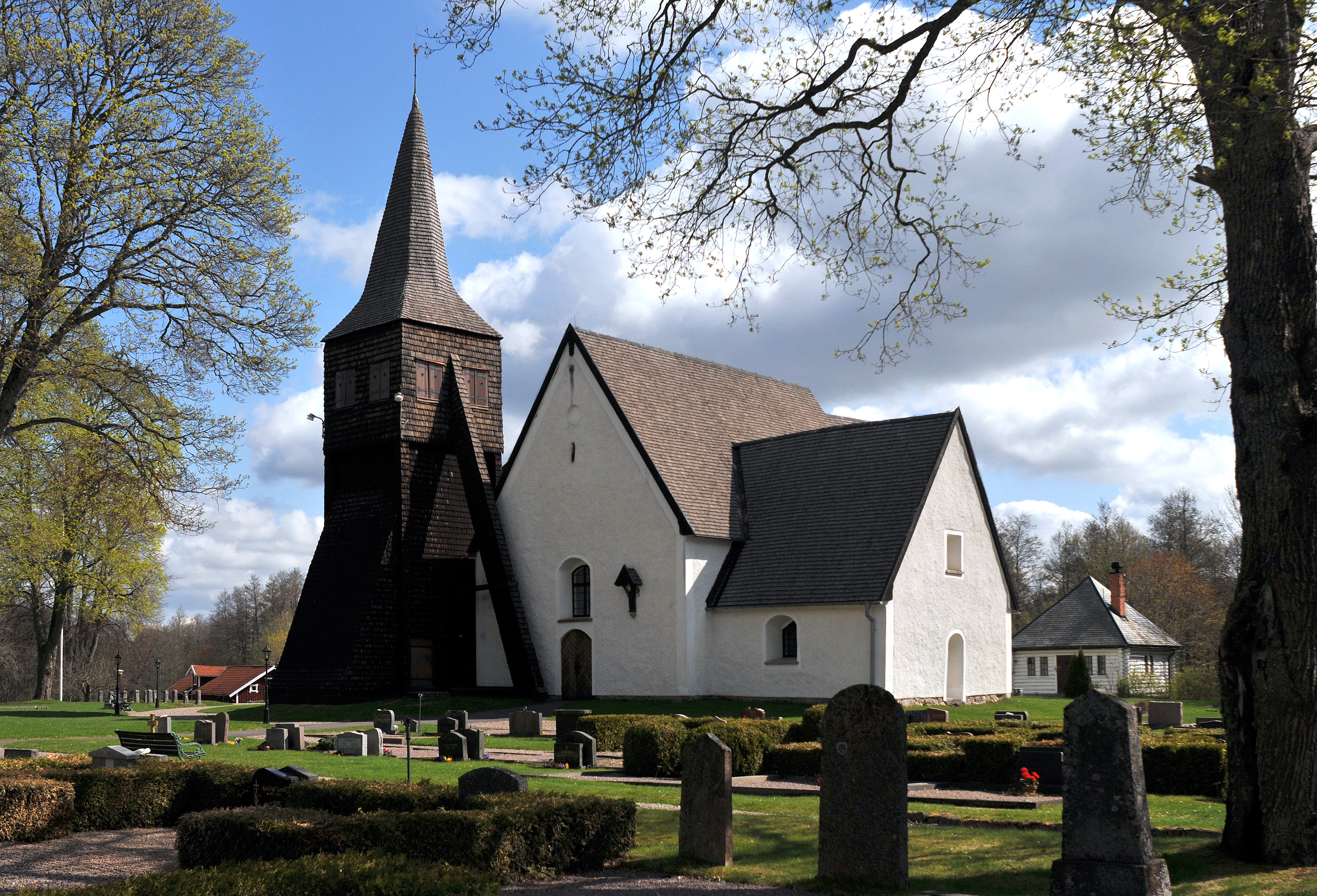 Godegårds kyrka i Linköpings stift cirka 29 km norr om Motala.